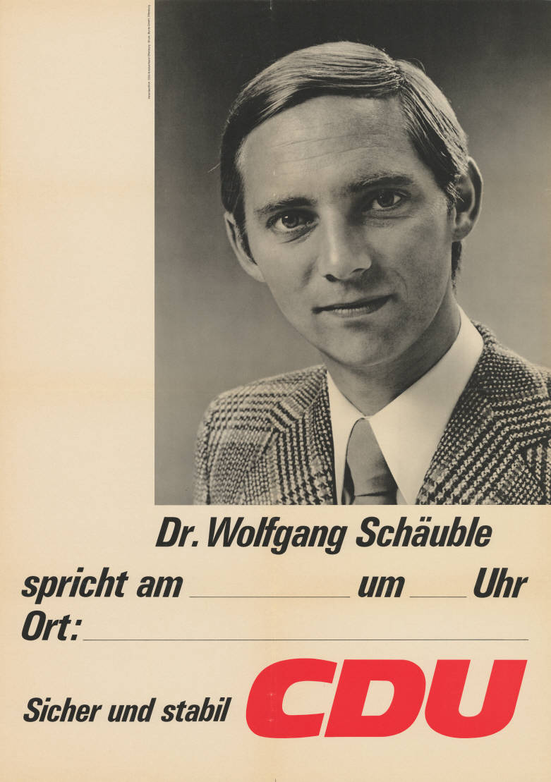 Dr. Wolfgang Schäuble spricht ... Sicher und stabil CDU Abbildung: Porträtfoto Plakatart: Blanko-Motiv-/Ankündigungsplakat Auftraggeber: Verantw.: CDU-KV Offenburg Drucker_Druckart_Druckort: Burda GmbH, Offenburg Objekt-Signatur: 10-031 : 822 Bestand: CDU-Plakate (10-031) GliederungBestand10-18: Personenplakate Lizenz: KAS/ACDP 10-031 : 822 CC-BY-SA 3.0 DE